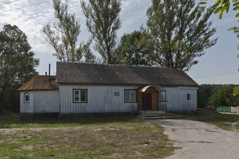 Сільський клуб в с. Залізня Житомирського району. Колишня старообрядницька церква, побудована місцевою громадою старообрядців. За часів радянської влади перебудована у сільський клуб. Знищений внаслідок підпалу у 2016 році.